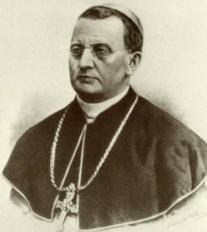 Hermann Jakob Dingelstad, Bischof von Münster 1889-1911